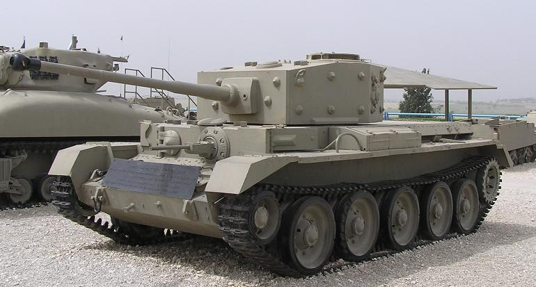 טנק שיוט קרומוול, תוצרת בריטניה. צולם על ידי בלטרון.